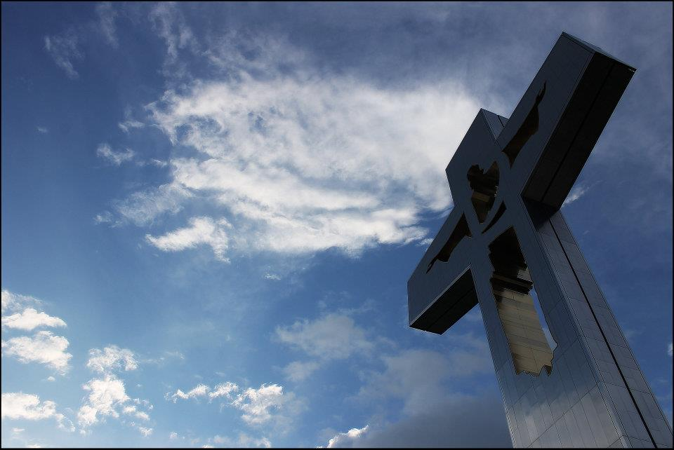 El Cristo de Chiapas,en lo bajo de su base.